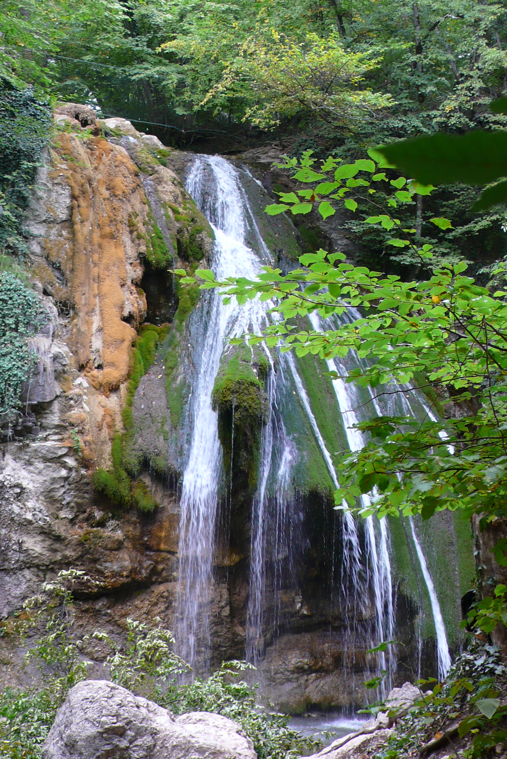 Джур-Джур. Крым